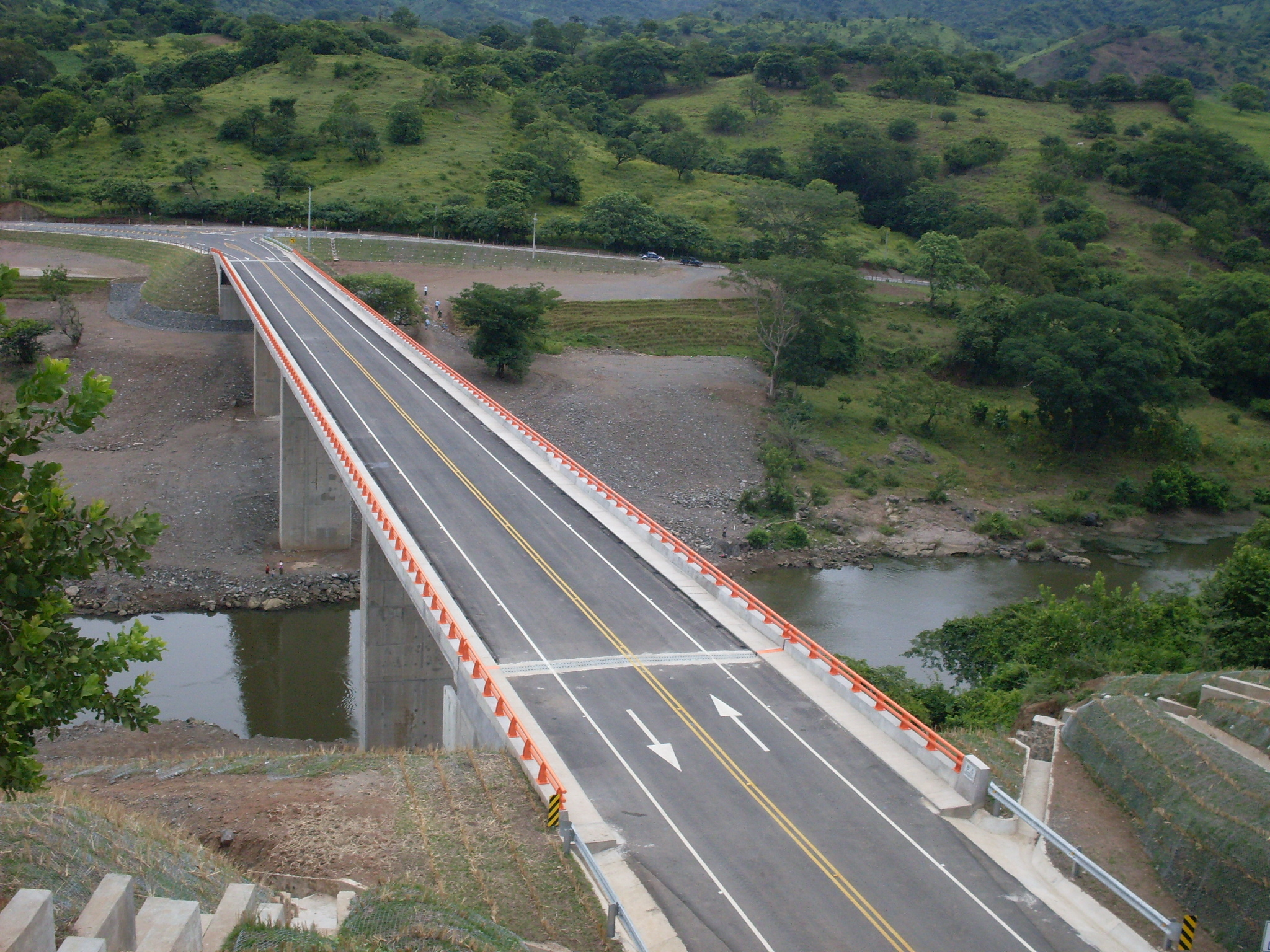 Puente Nombre de Jesús el mas alto de El Salvador